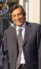 İş insanı Murat Özaydınlı